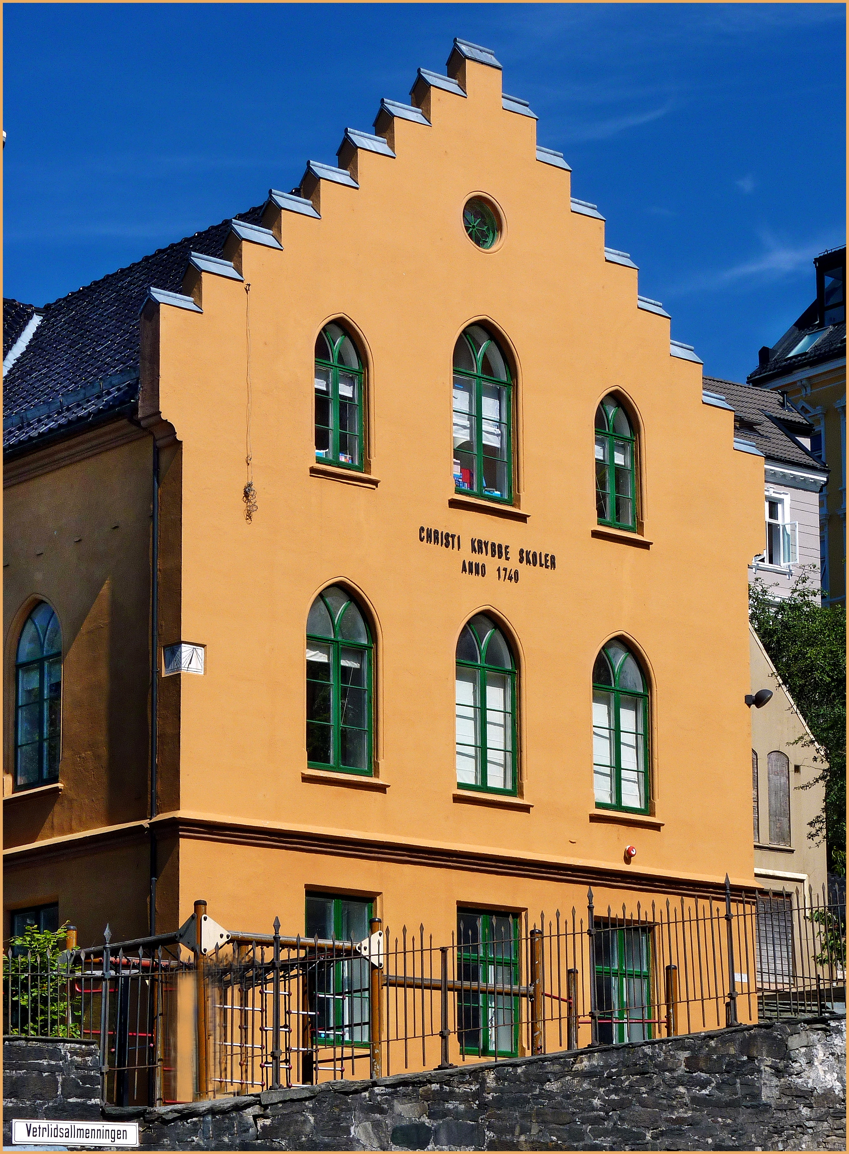 Christi Krybbe Skoler 1740 - Bergen